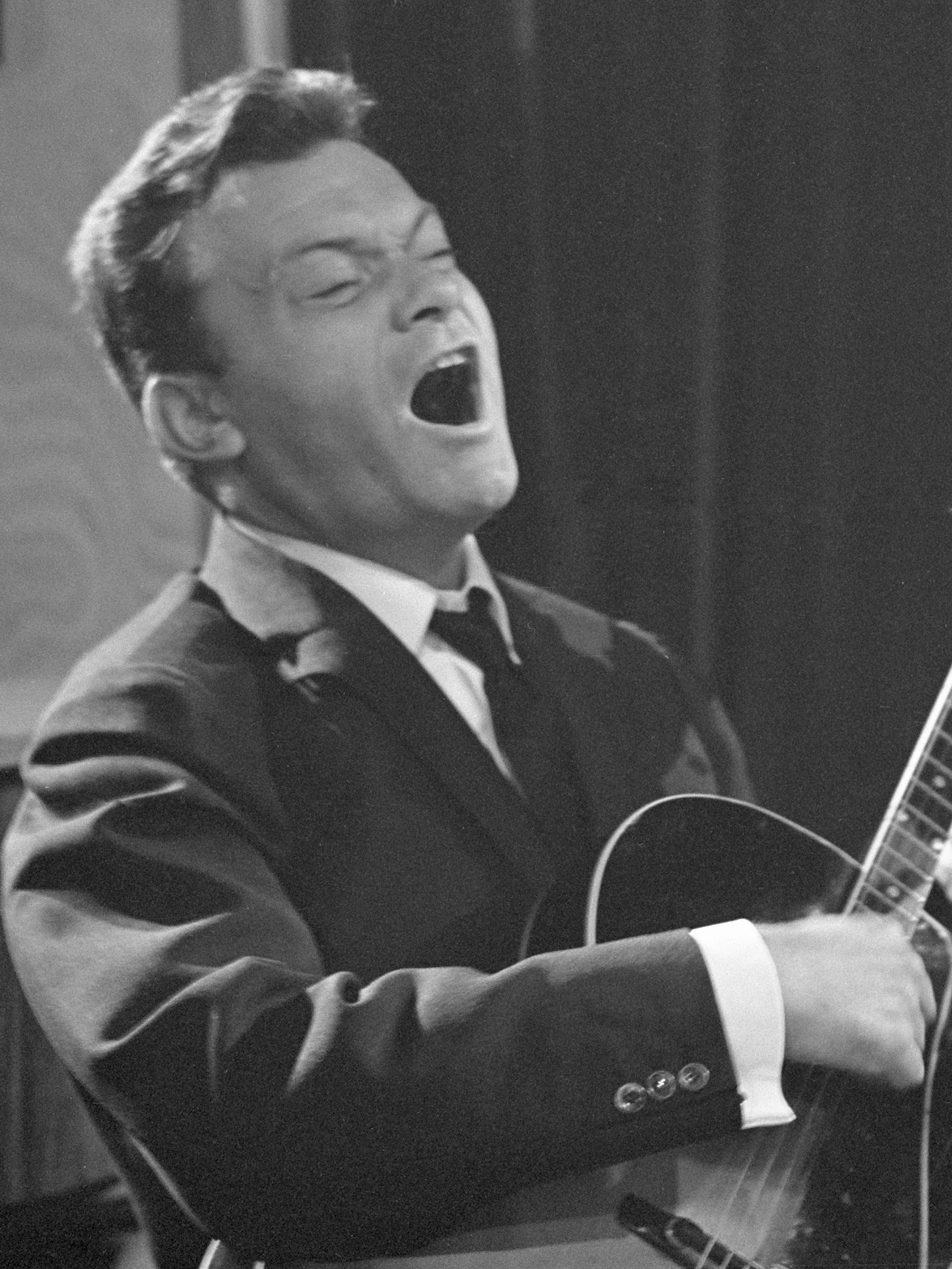 Deens-Franse chansonnier cabaretier Georges Ulmer in TV (AVRO) "Club Domino" 23 februari 1962